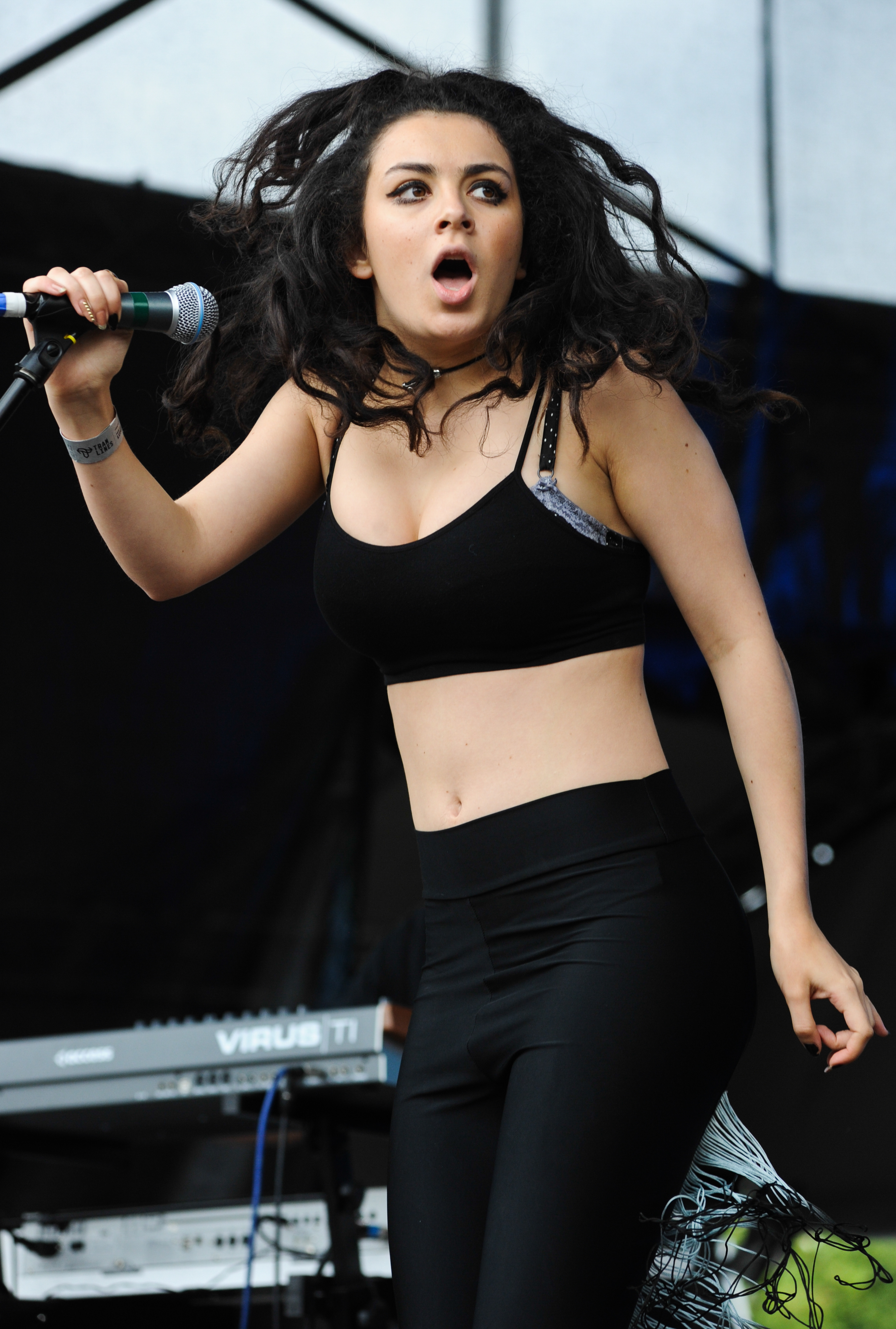 Charli XCX - Main Stage - Tramlines 2012